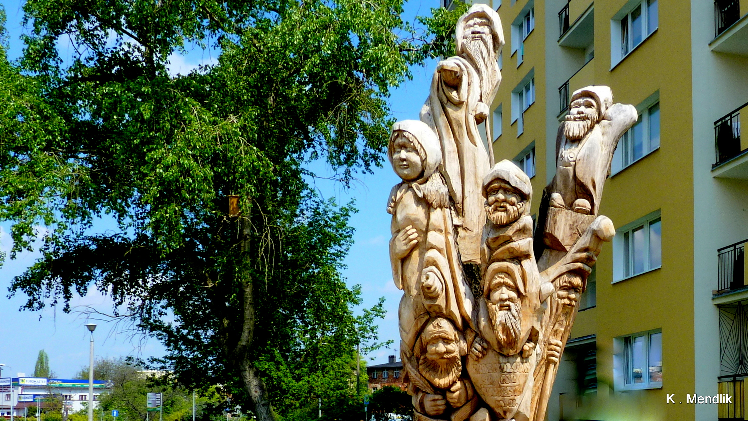 Wyrzeźbiona grupa Krasnoludków z bajki Marii Konopnickiej.